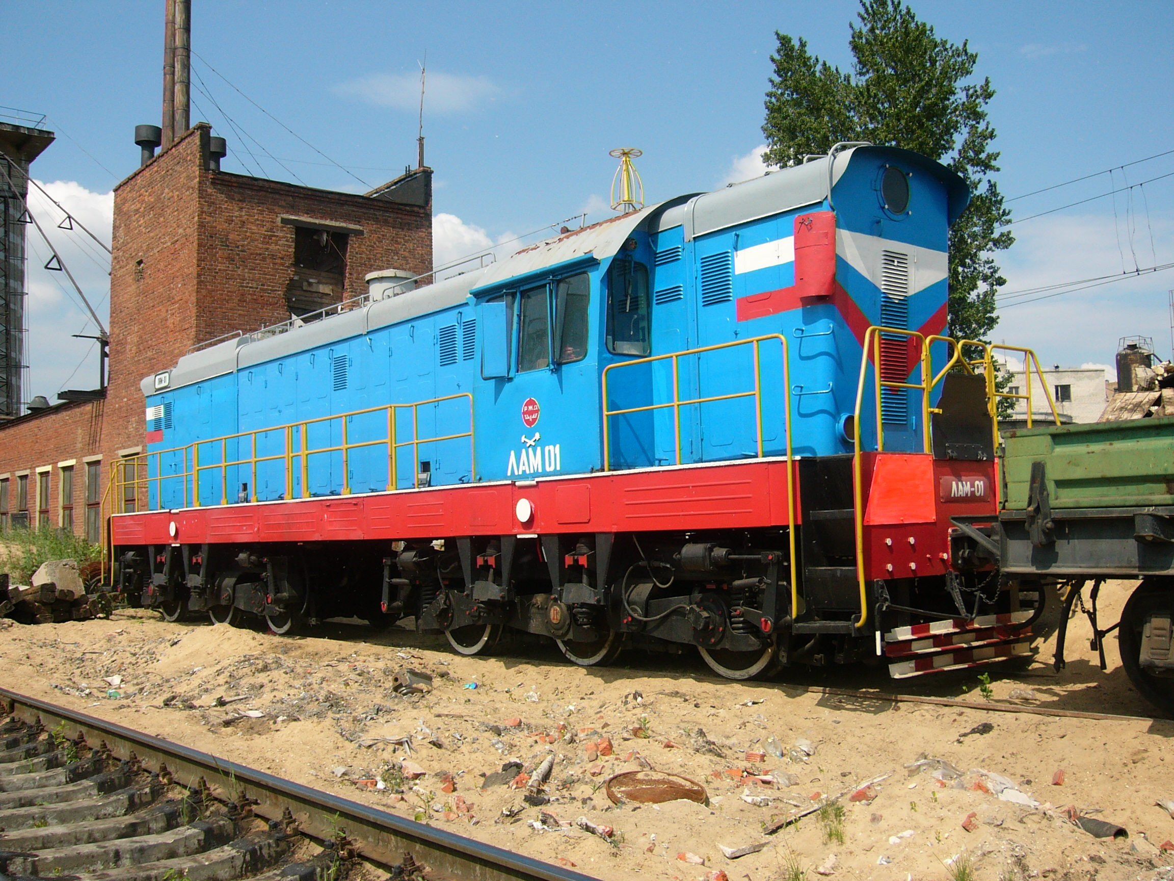 Маневровый аккумуляторный электровоз ЛАМ-01 в депо Москва-3. Переделан из тепловоза ЧМЭ3.